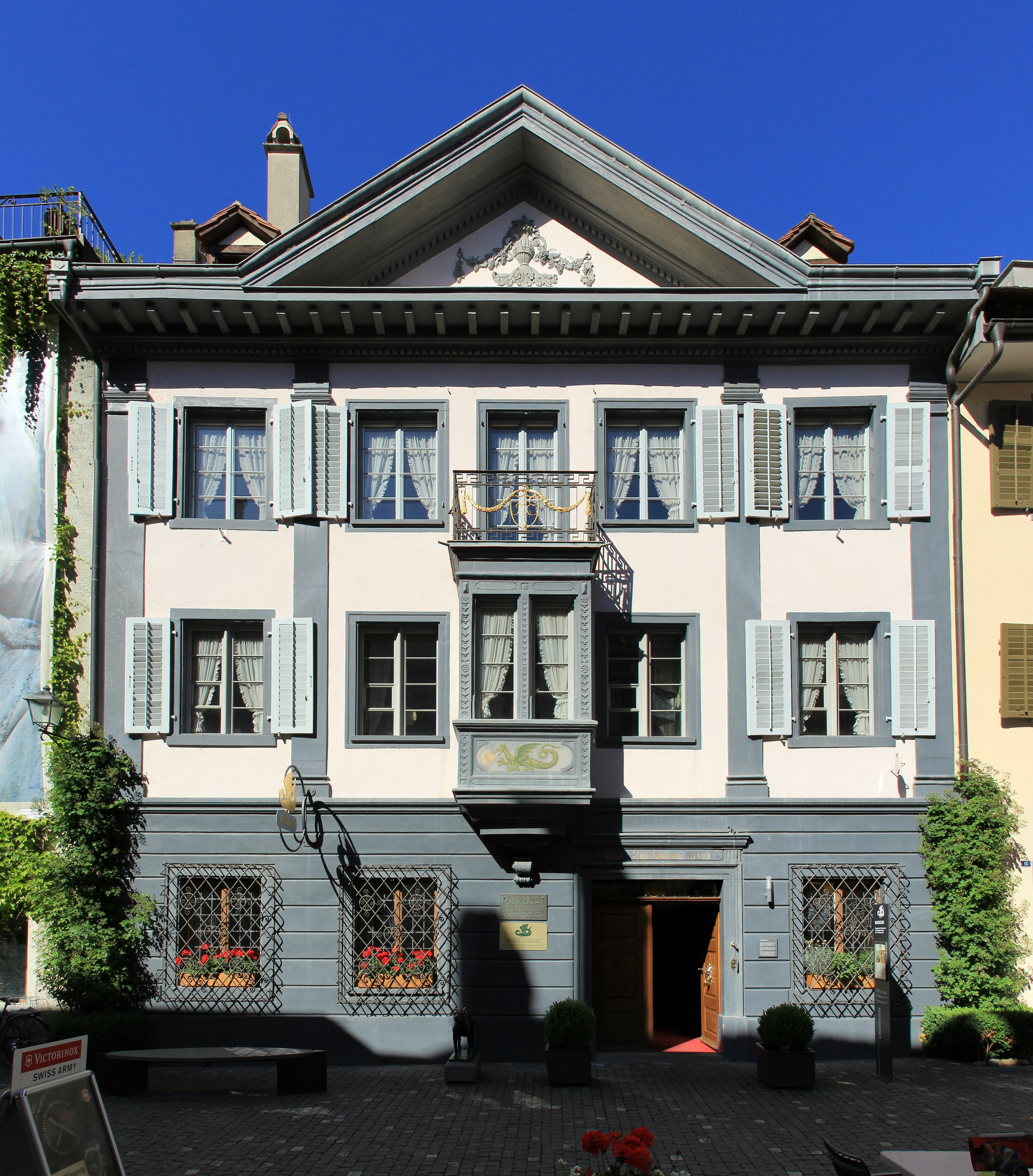 Haus Lindwurm in Stein am Rhein Das Museum für Wohnkultur und Landwirtschaft des 19. Jh. präsentiert sich in starkem Konstrast zu seiner Umgebung. Die einzige in der Stadt erhaltene stilreine Empire-Fassade (1819/1820) erinnert eher an ein Stadtpalais denn an ein Bürgerhaus. 1571 wurden hier zwei mittelalterliche Wohn- und Handwerkhäuser zusammengefasst und um eine Etage erhöht. Niemand vermutet den stilvollen Ökonomietrakt im Hintergebäude. Der Name des Hauses spielt auf das Steiner Wappentier, den Drachen, an. Hier verbrachte der berühmte Chemiker und ETH-Professor Robert Gnehm (1852-1926) seine Jugendzeit. In diesem Haus wohnten auch Jakob und Emma Windler, die Begründer der gleichnamigen Stiftung.